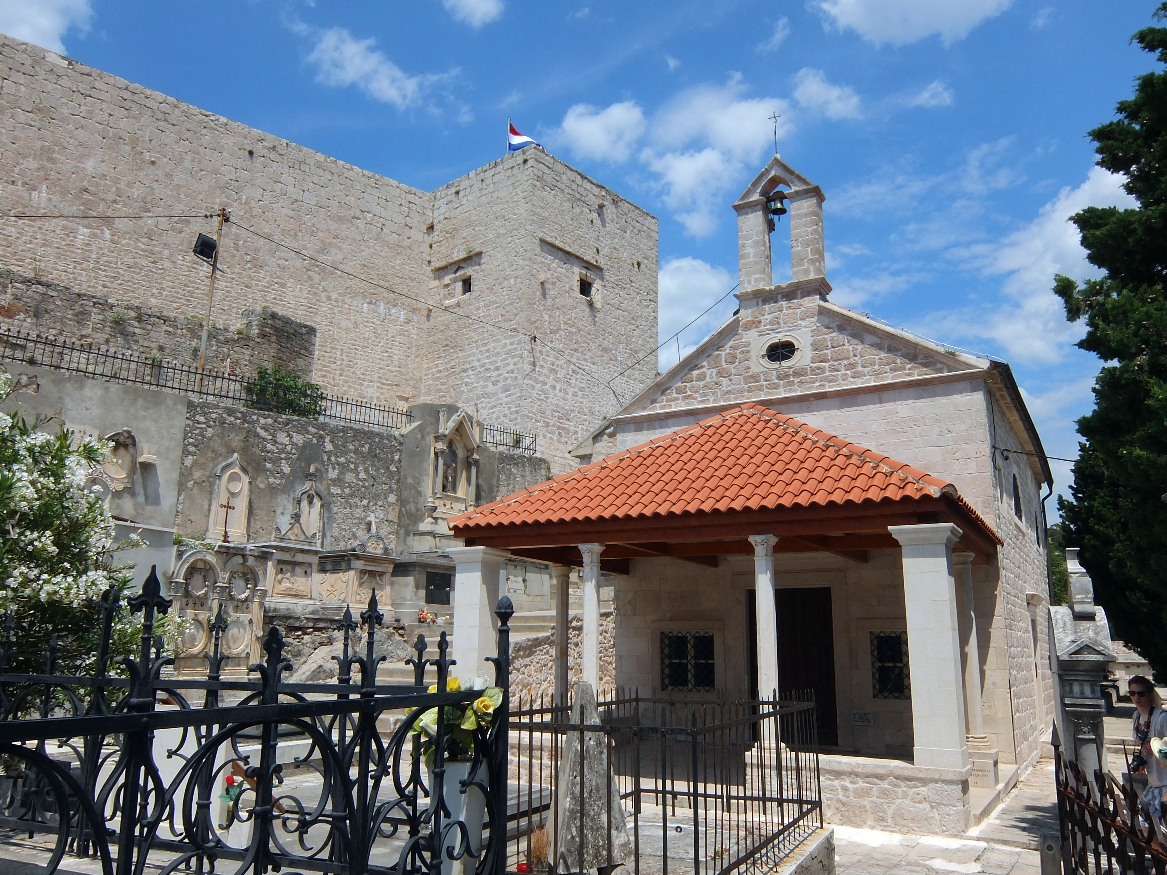 Srpskohrvatski / српскохрватски: Crkvica i groblje sv. Ane unutar fortifikacije šibenskog kaštela